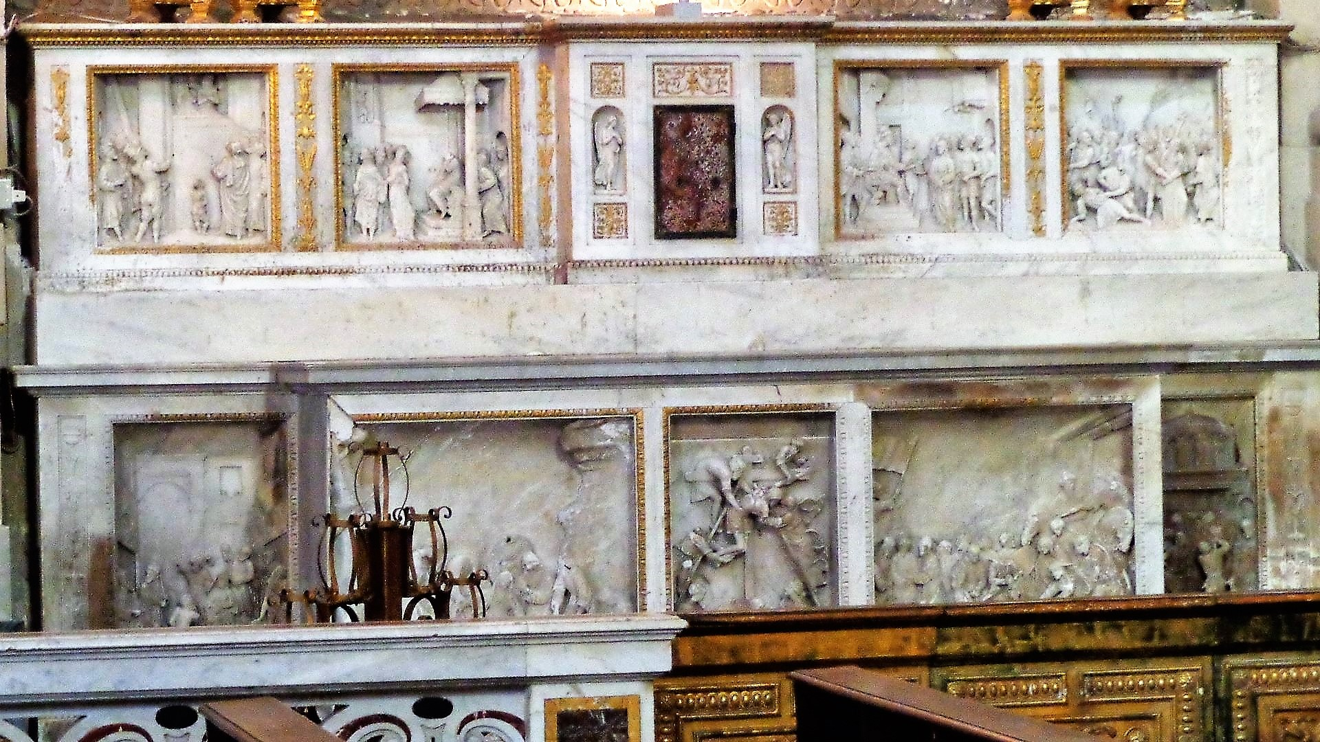 Formelle Gagini - Altare del Crocifisso